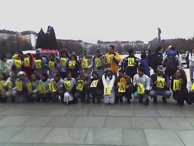 Протест на еколози срещу отлагането на част от териториите по Натура 2000. Пред НДК, София